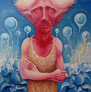 obraz 1x1m, rok 2006